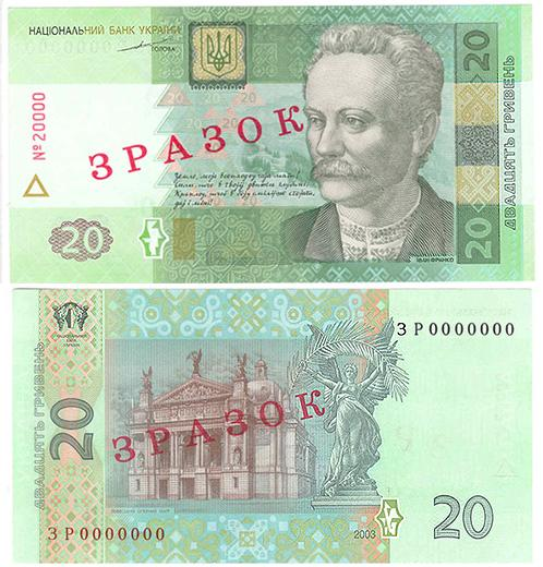 20-Hrywnja-Schein, 2003